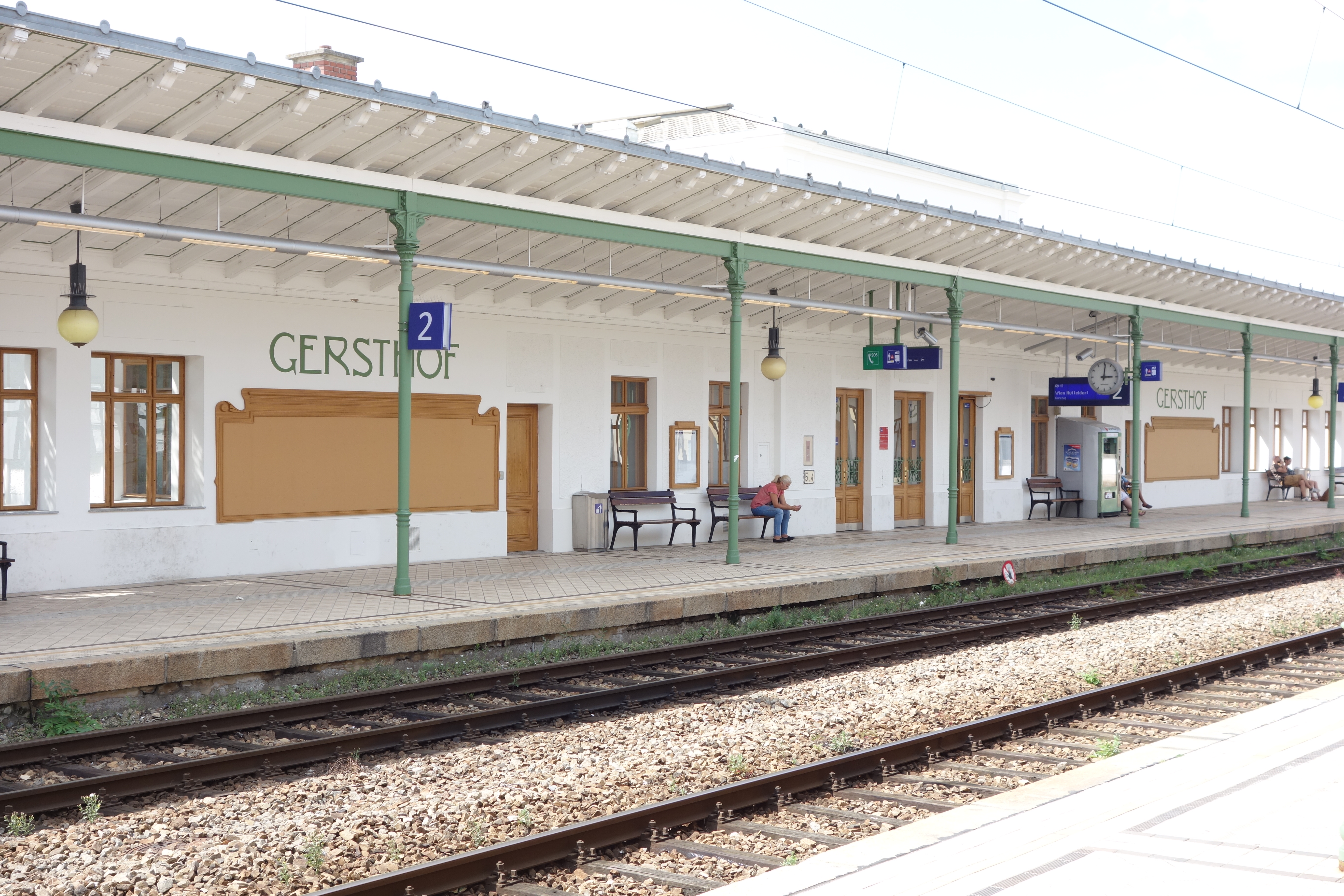 Bahnsteig 2 der Haltestelle Wien Gersthof im Juli 2016.